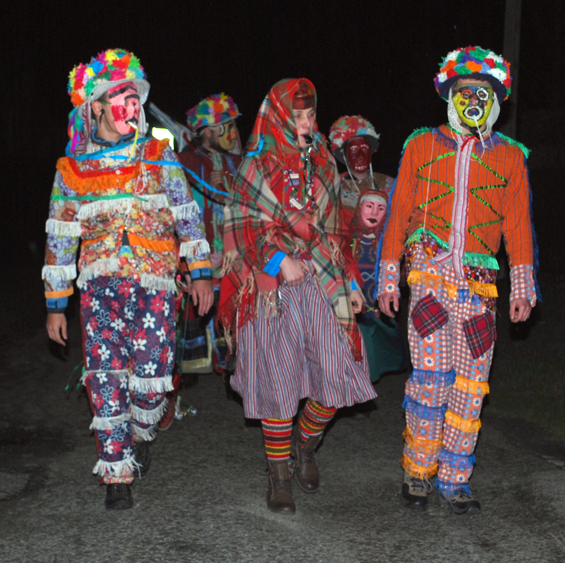 Śmierguśnicy maszerują w maskach